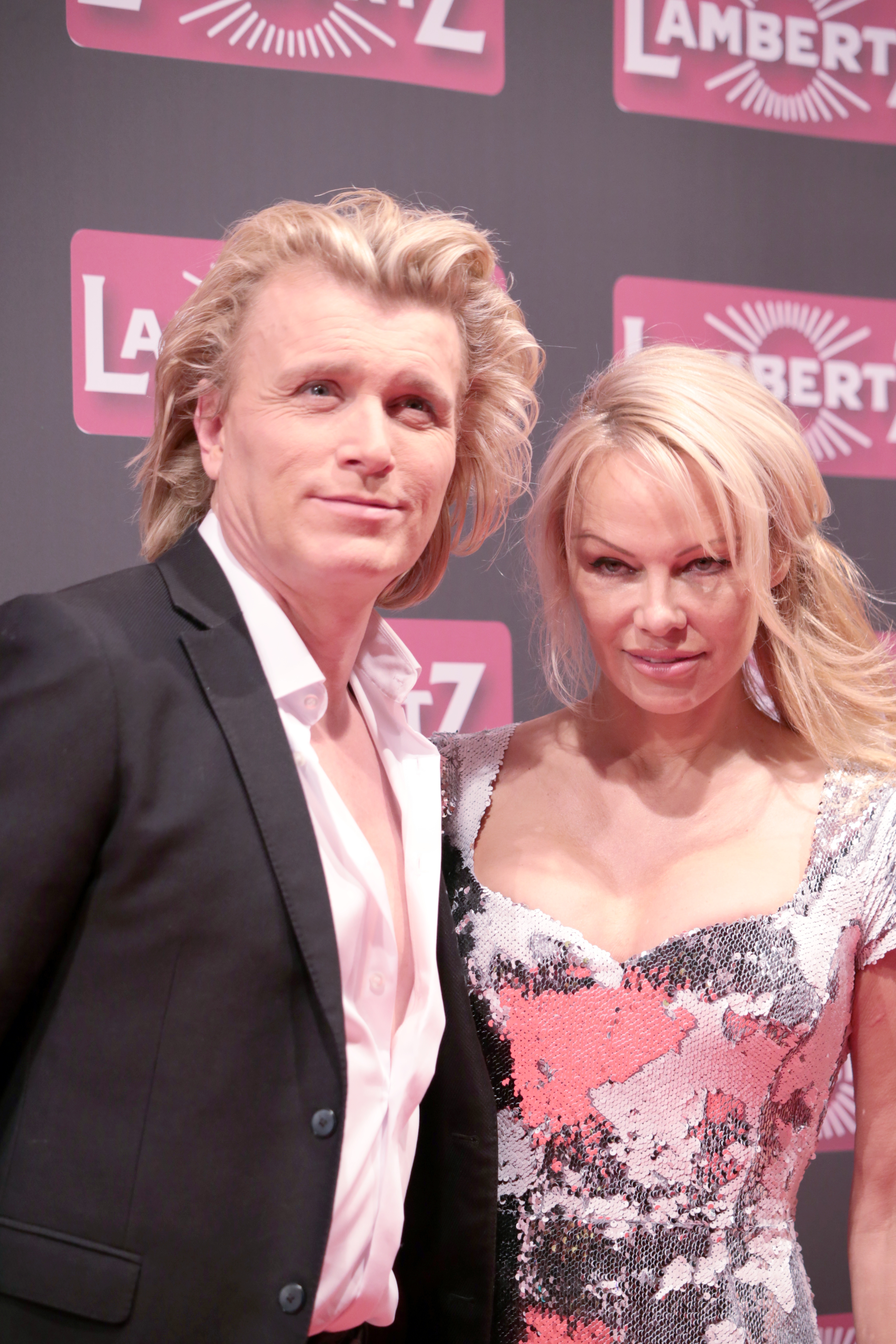 Hans Klok, Pamela Anderson bei der Lambertz Monday Night 2018.